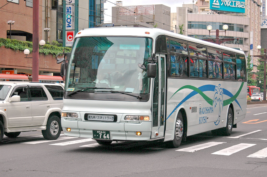 鹿児島市内にて、2006-5-2 撮影